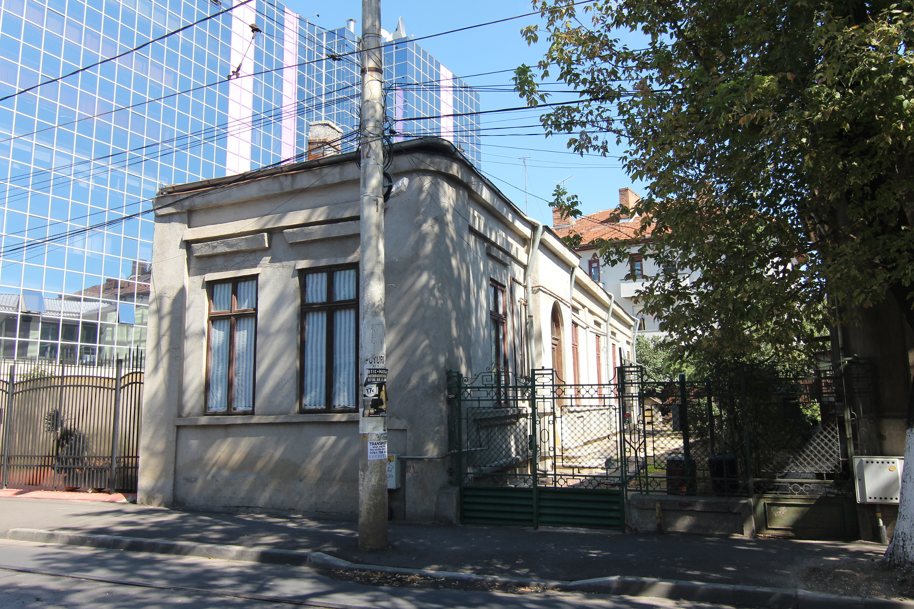 Casă pe strada Traian